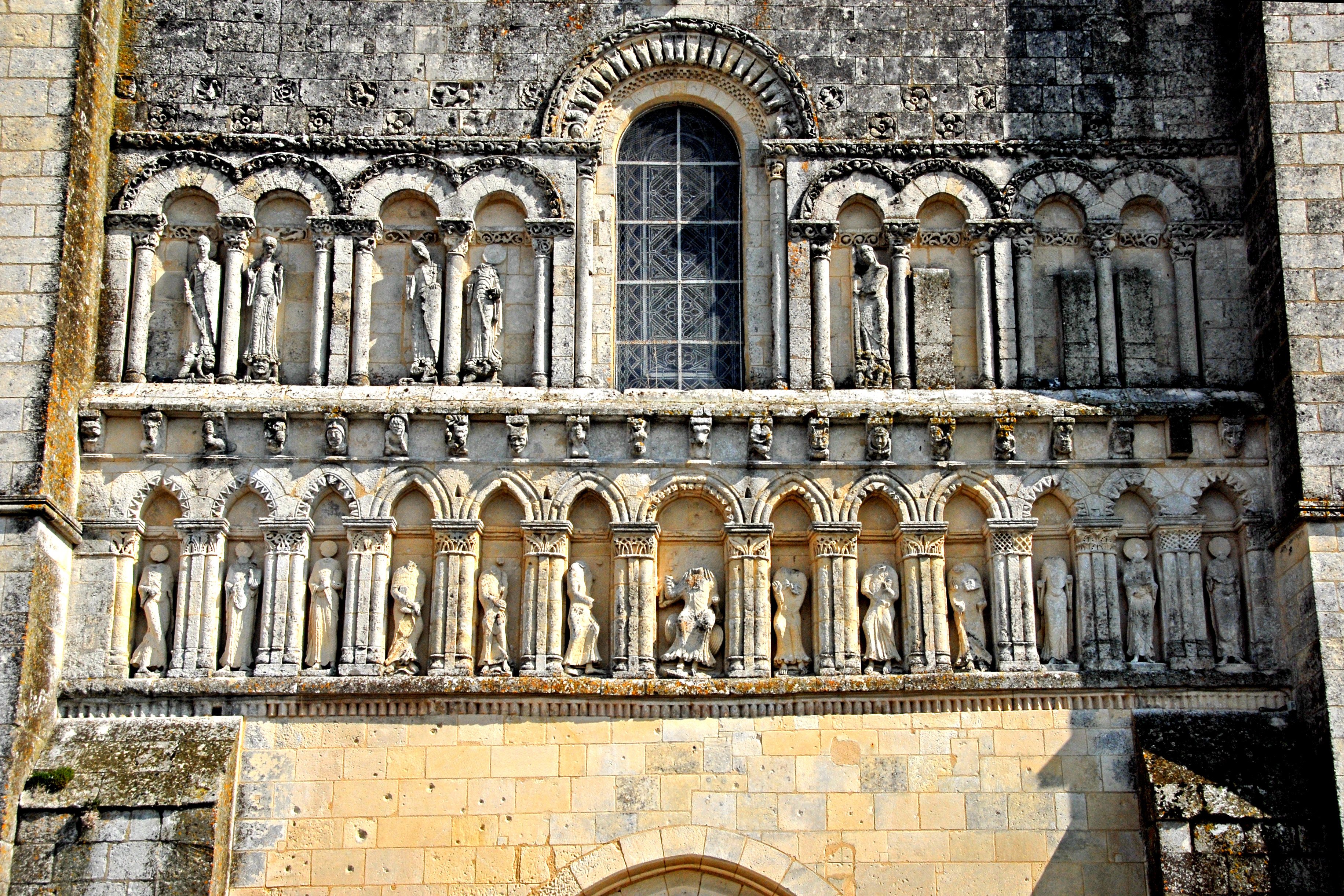 Pfarrkirche Saint-Pierre-de-Pérignac, Arkaturen